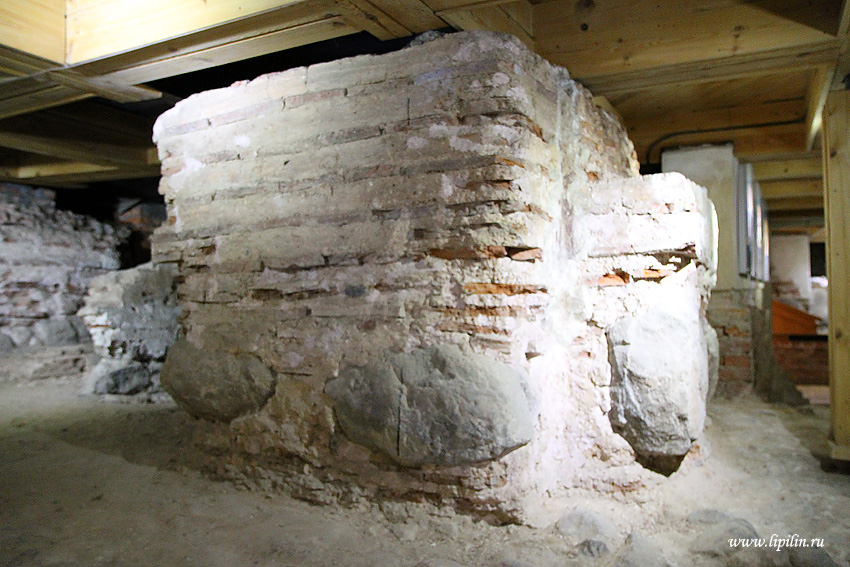 Полацк. Падмуркі сабора